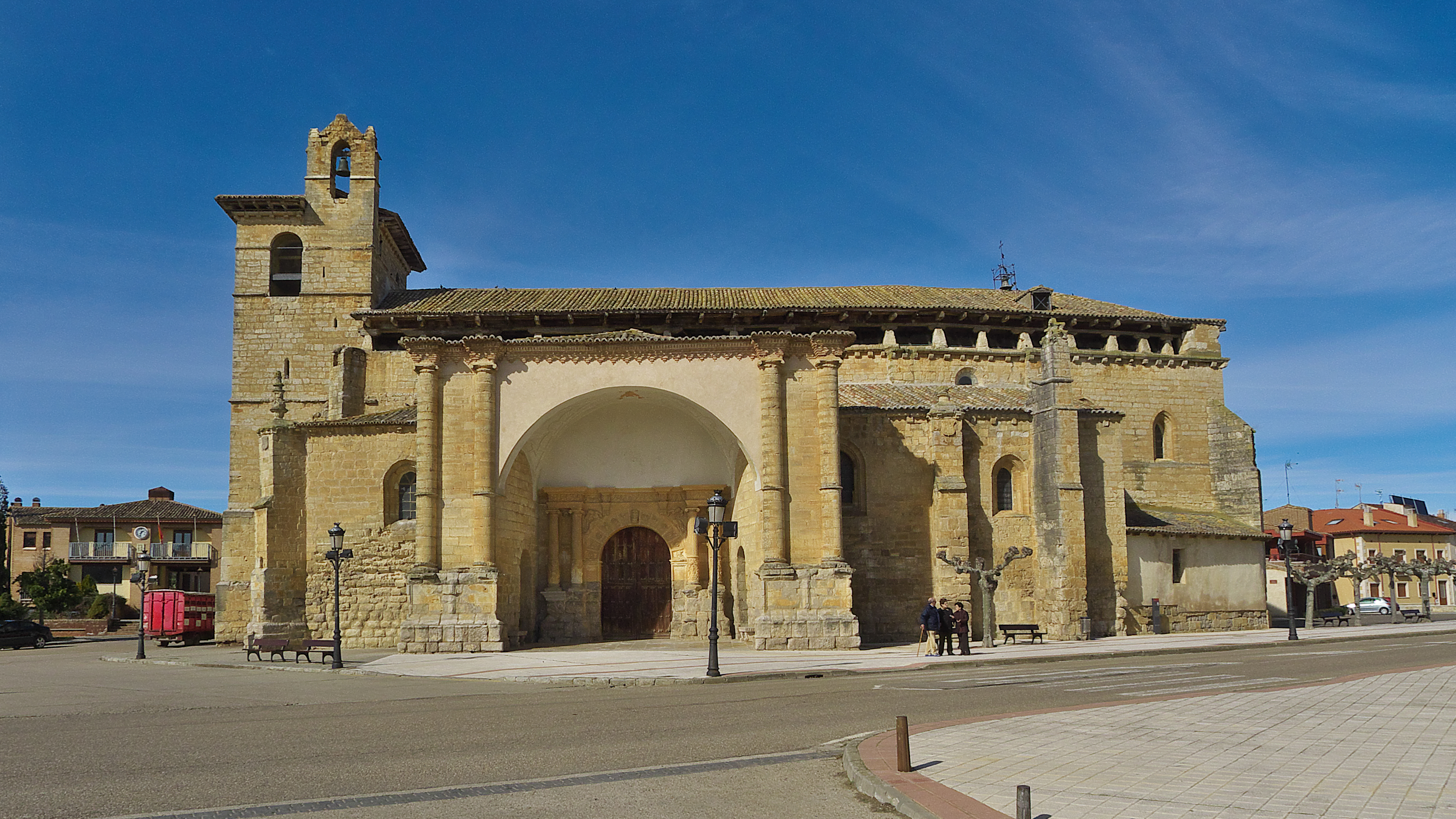 Fachada meridional (ss. XV-XVI)